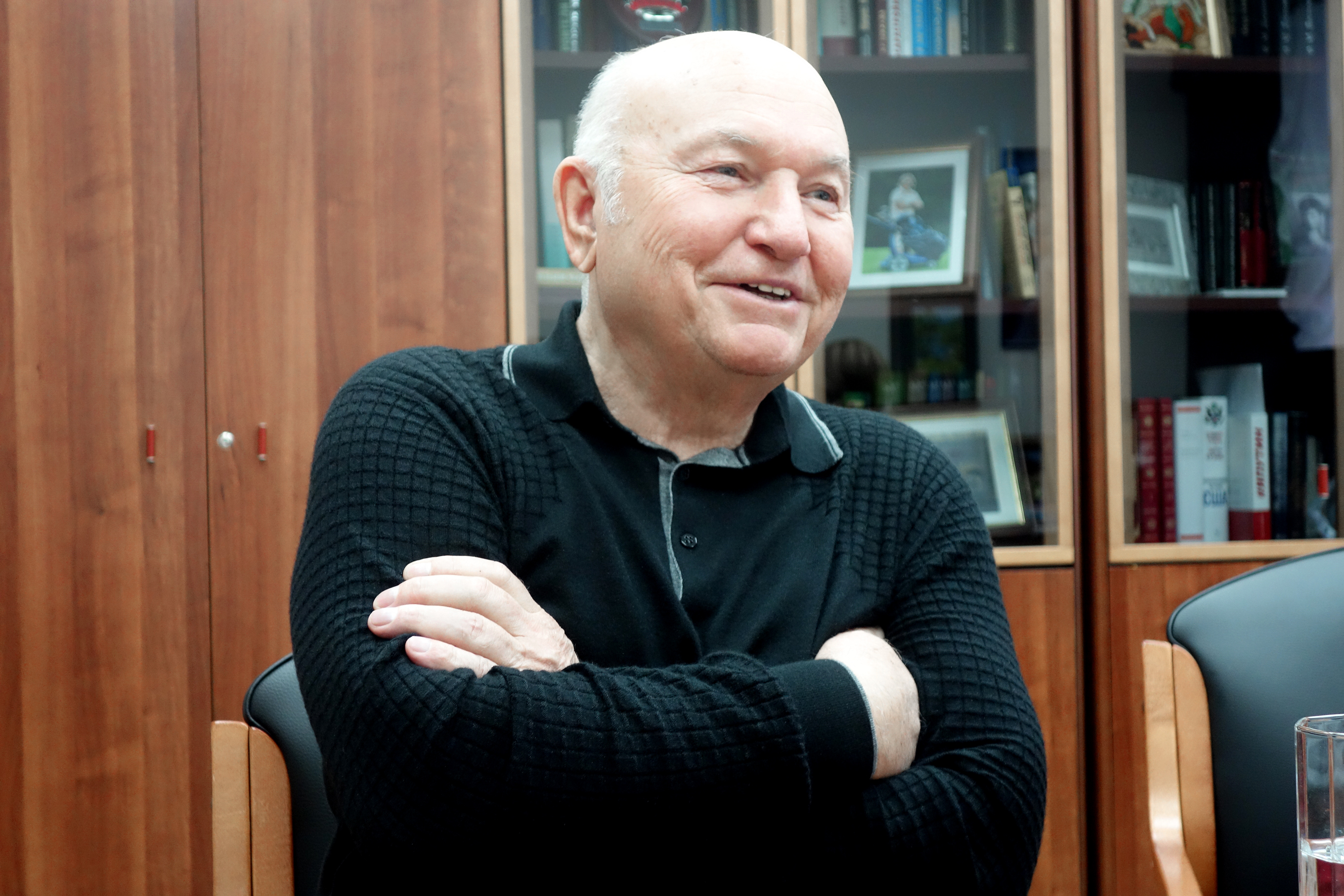 Юрий Лужков